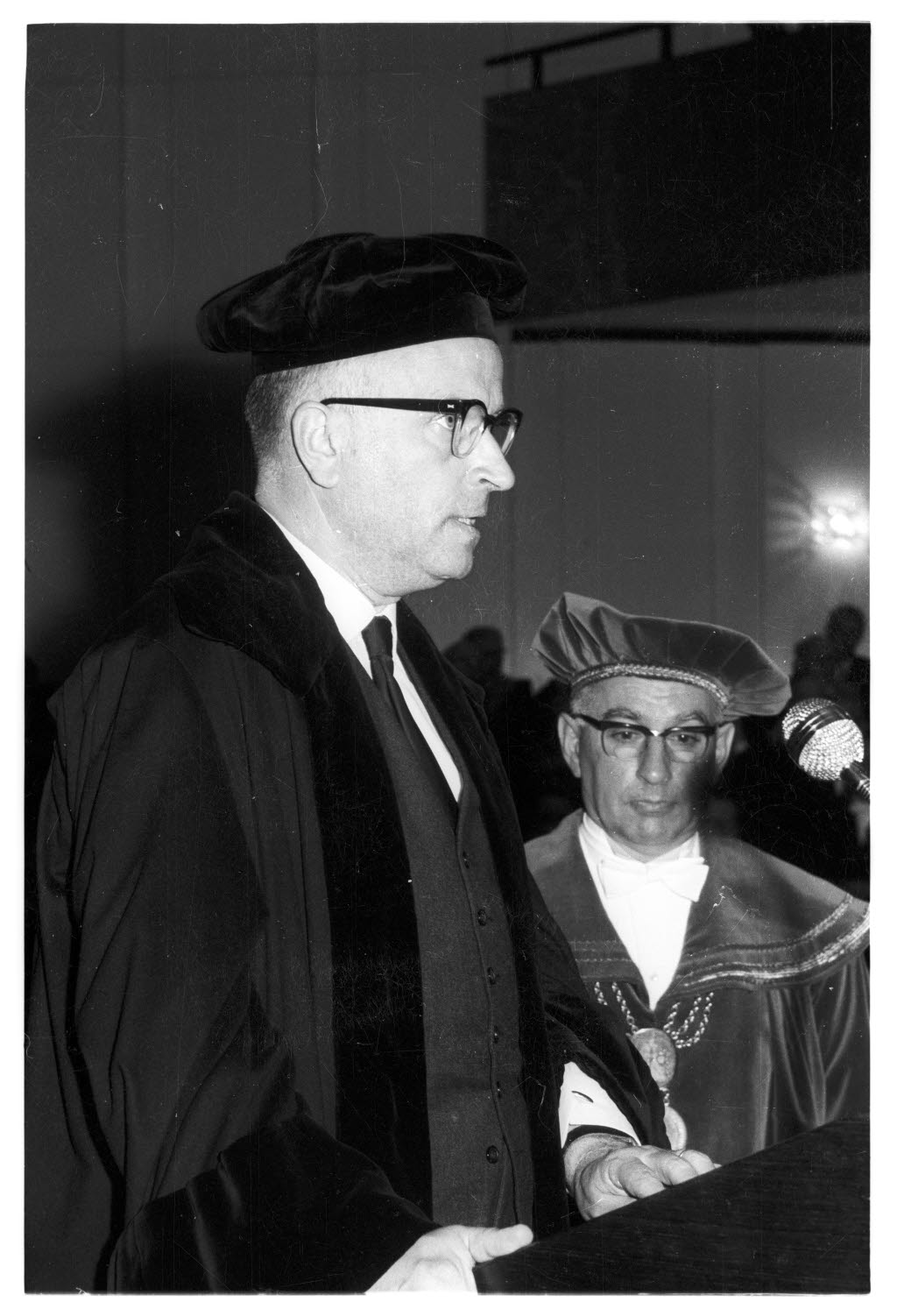 Zweiter Festakt in der Konzerthalle am Schloss. Am Rednerpult Prof. Dr. Willem de Boer von der Universität Leiden als Gratulant. Im Hintergrund rechts der CAU-Rektor Prof. Dr. Wolfgang Bargmann.